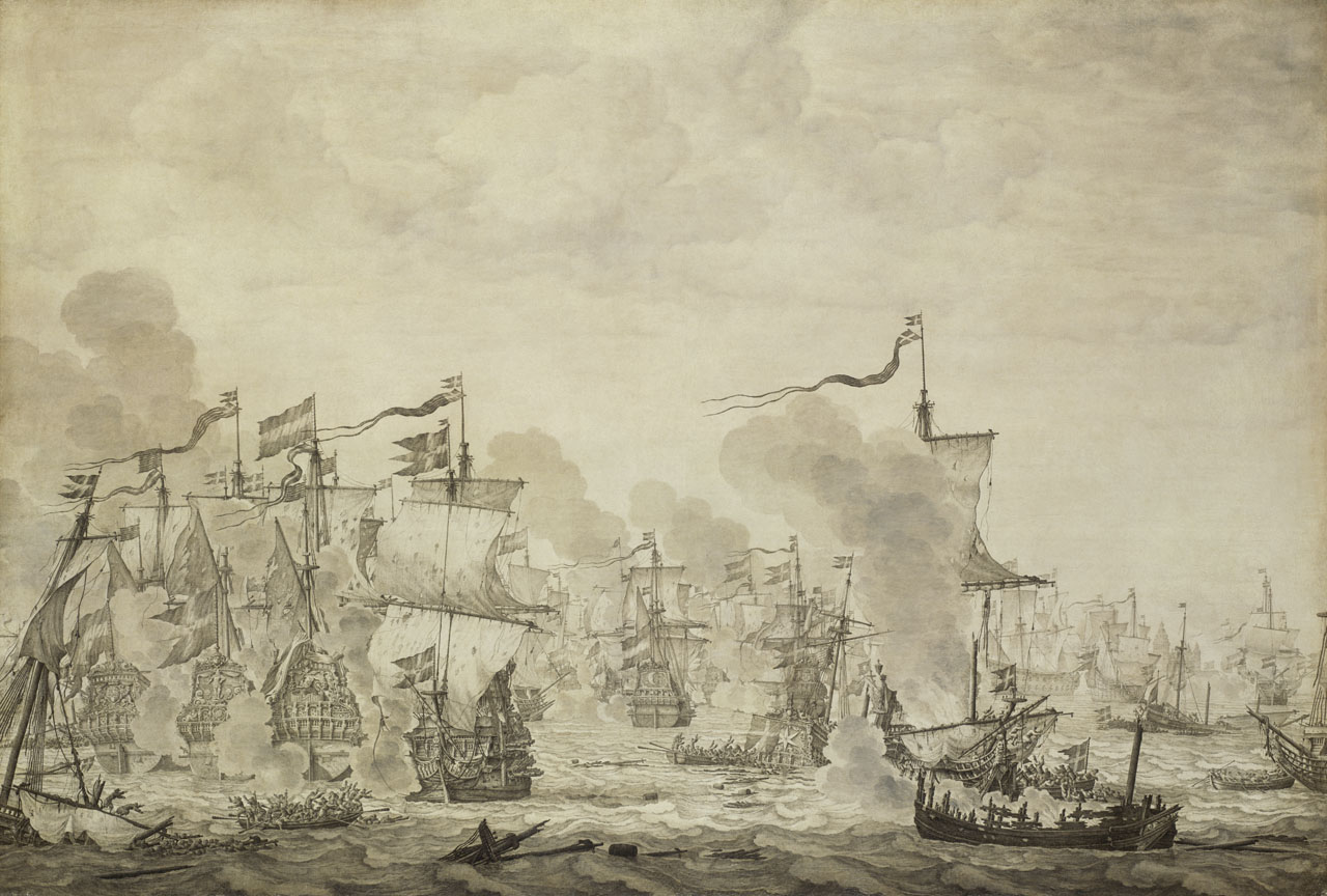 Eine andere Version der Seeschlacht im Öresund 1658